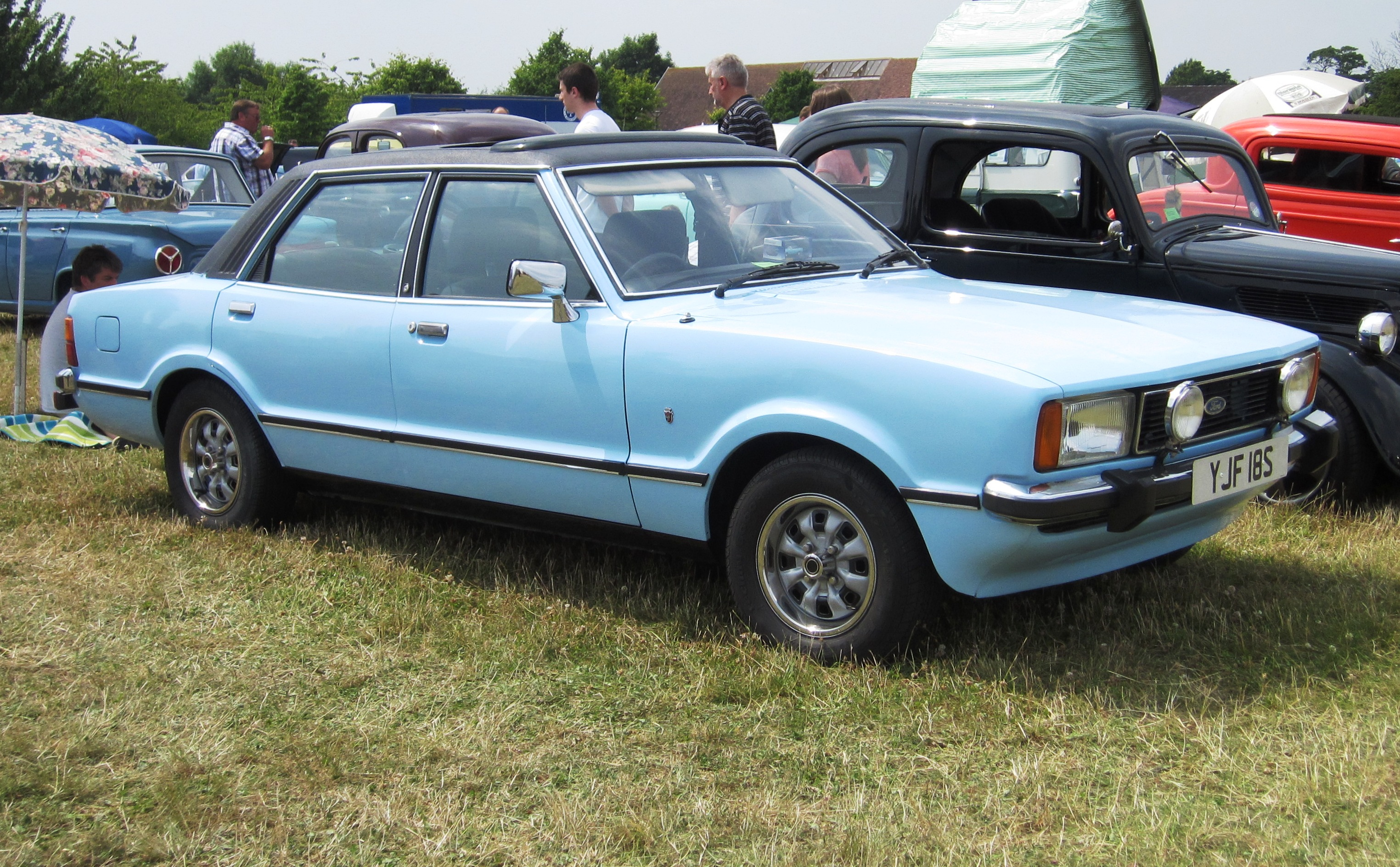 Ford Cortina Ghia Mk IV Saloon (1978)